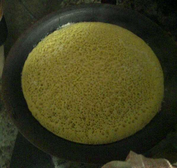 La Zeppola di Nocelleto nel suo "ruoto"